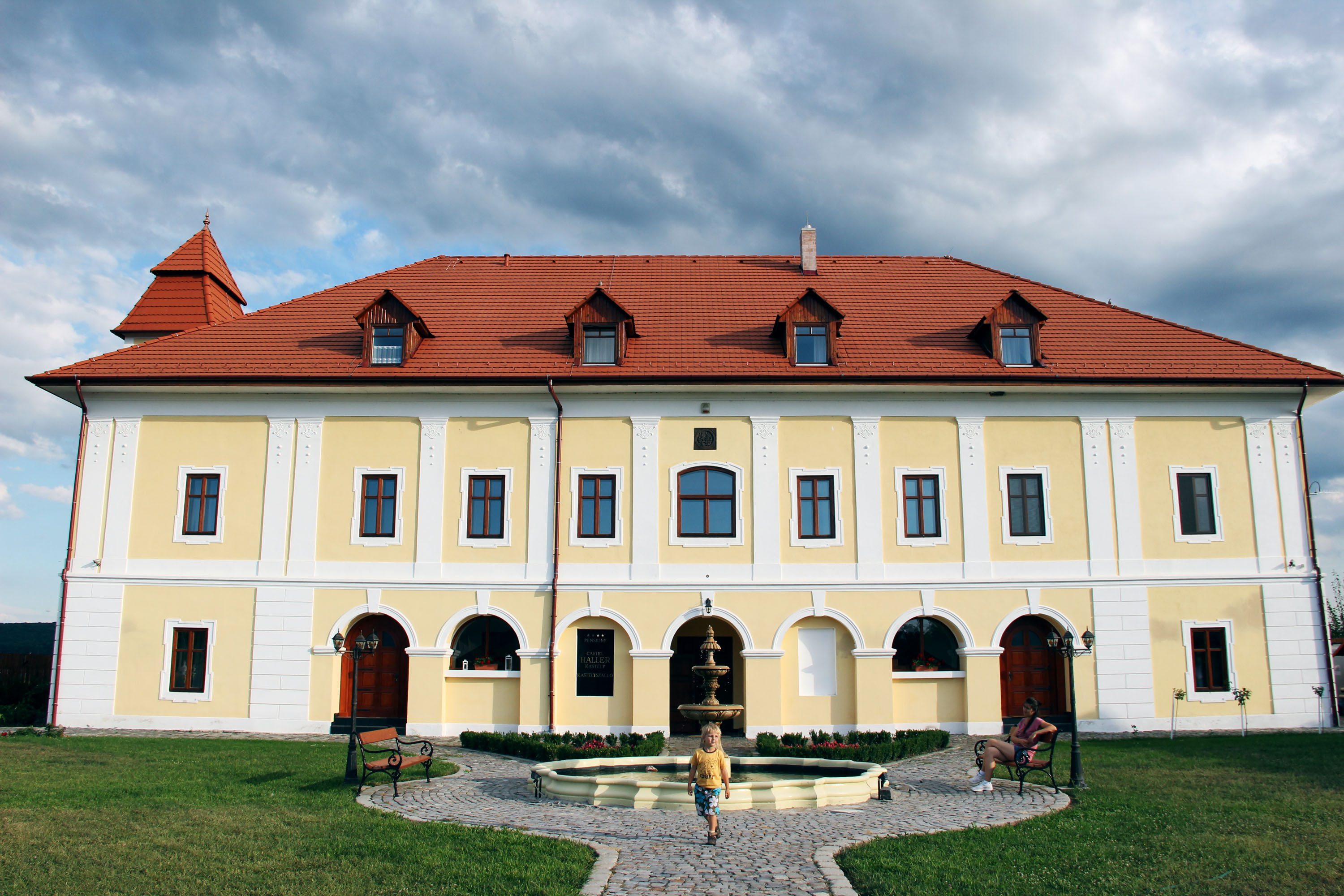 Castelul Haller